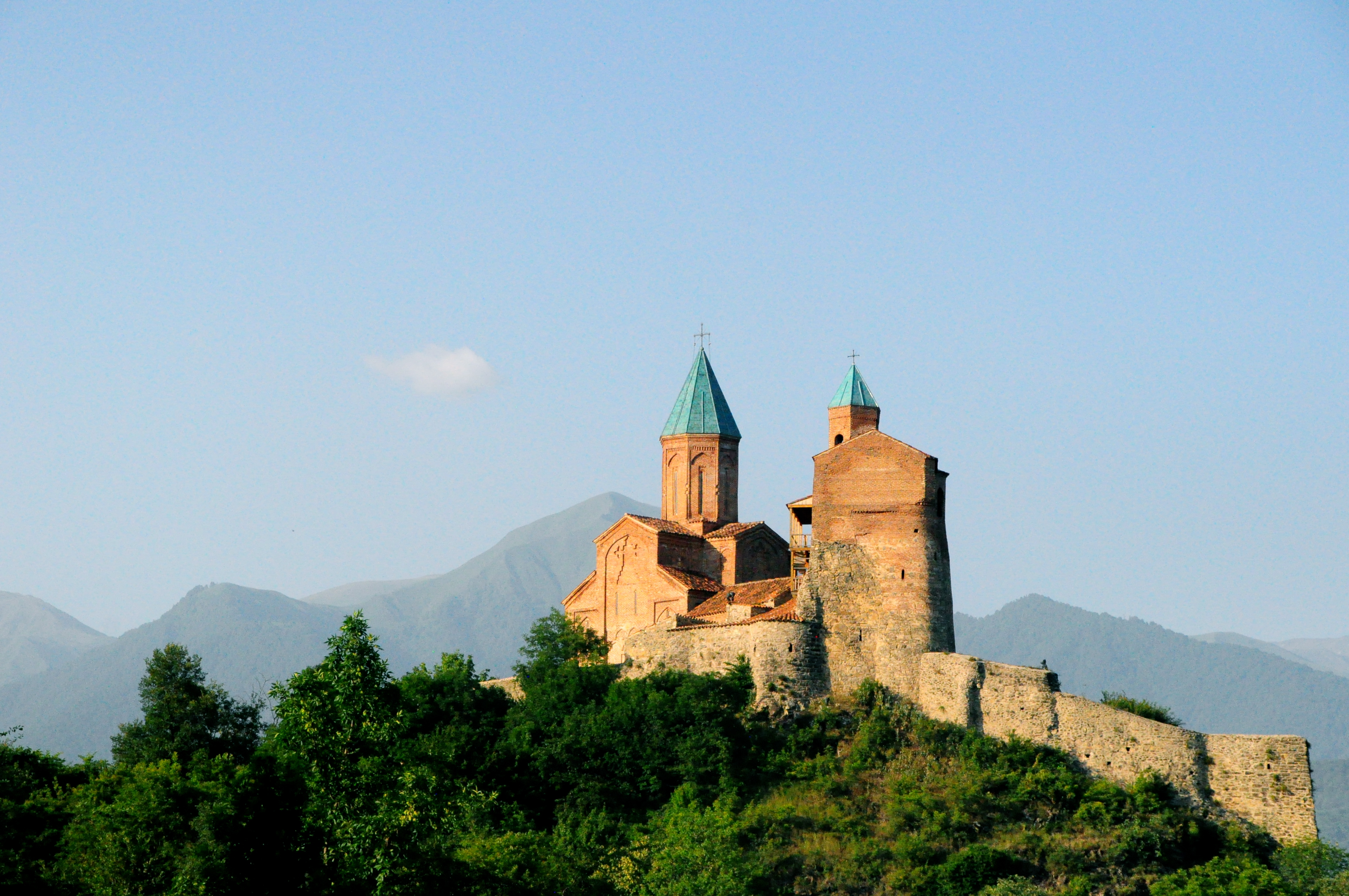 15465 Kakheti